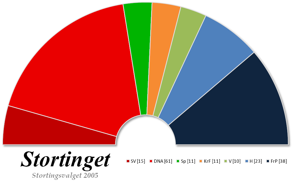 Composition du Parlement norvégien à l'issue des élections législatives de 2005.